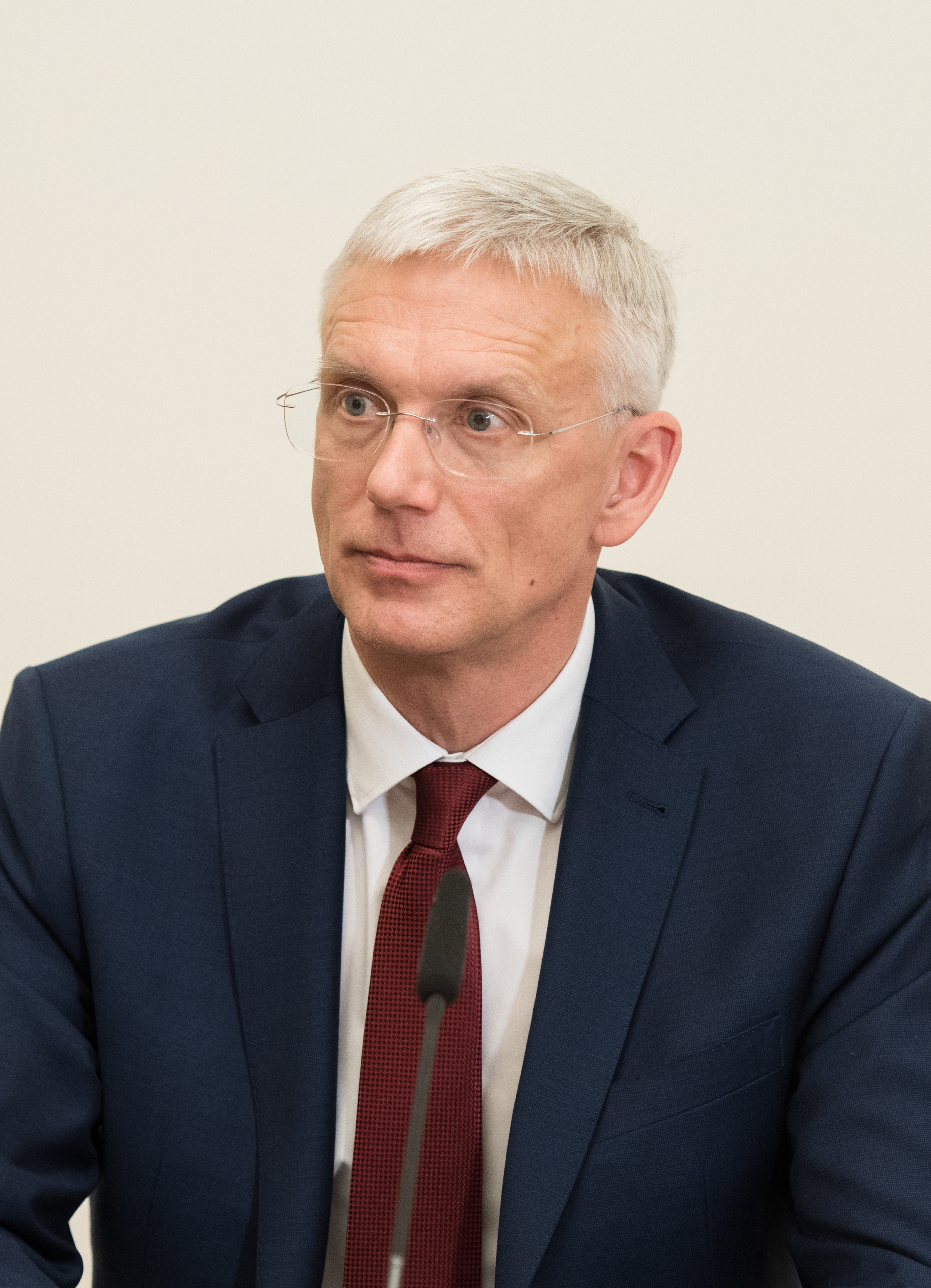 2019.gada 23.janvāris. Krišjāņa Kariņa valdības apstiprināšana Saeimas ārkārtas sēdē. Foto: Ieva Ābele, Saeima Izmantošanas noteikumi: saeima.lv/lv/autortiesibas